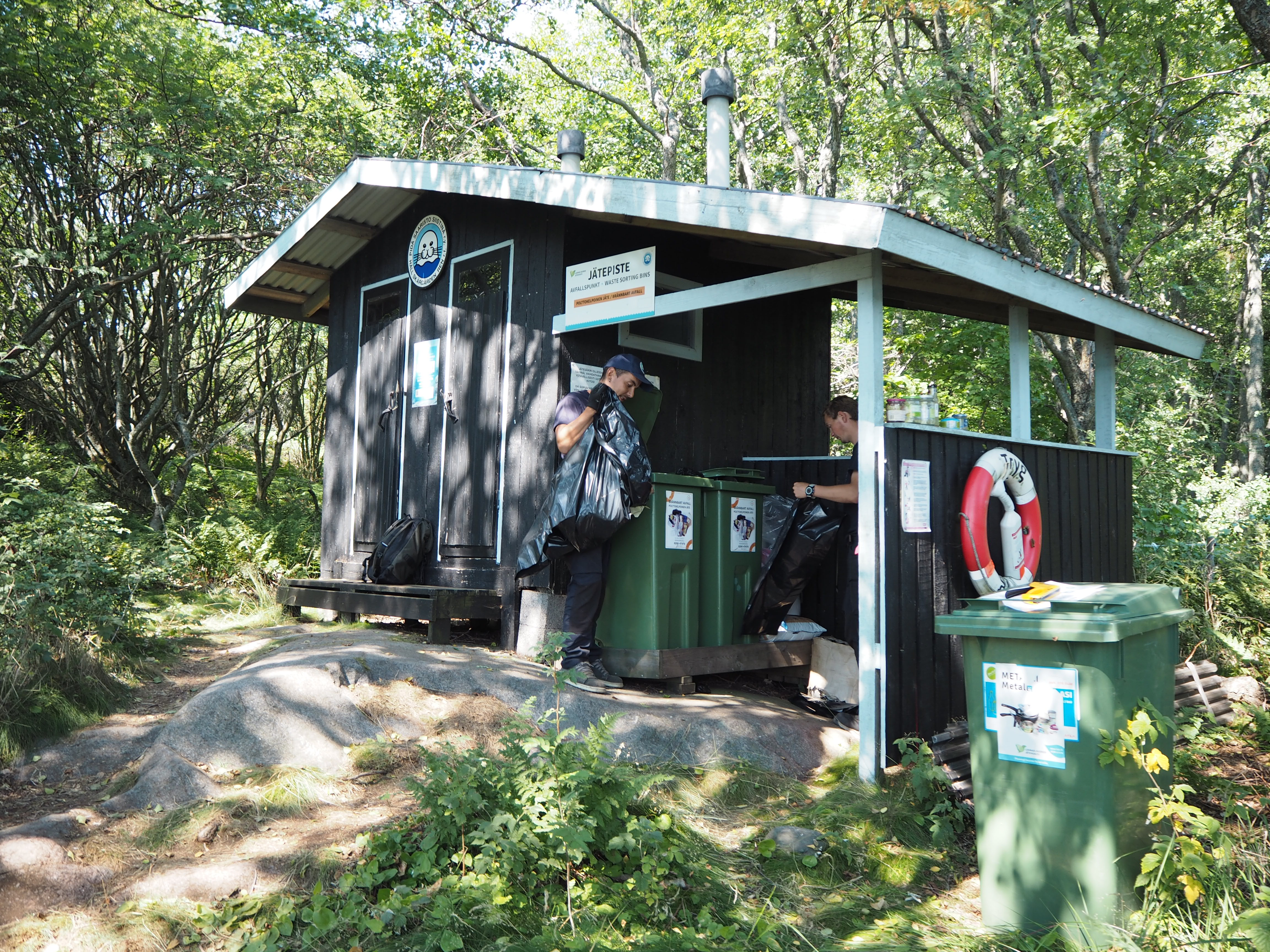 Kuivakäymälä ja jätepiste